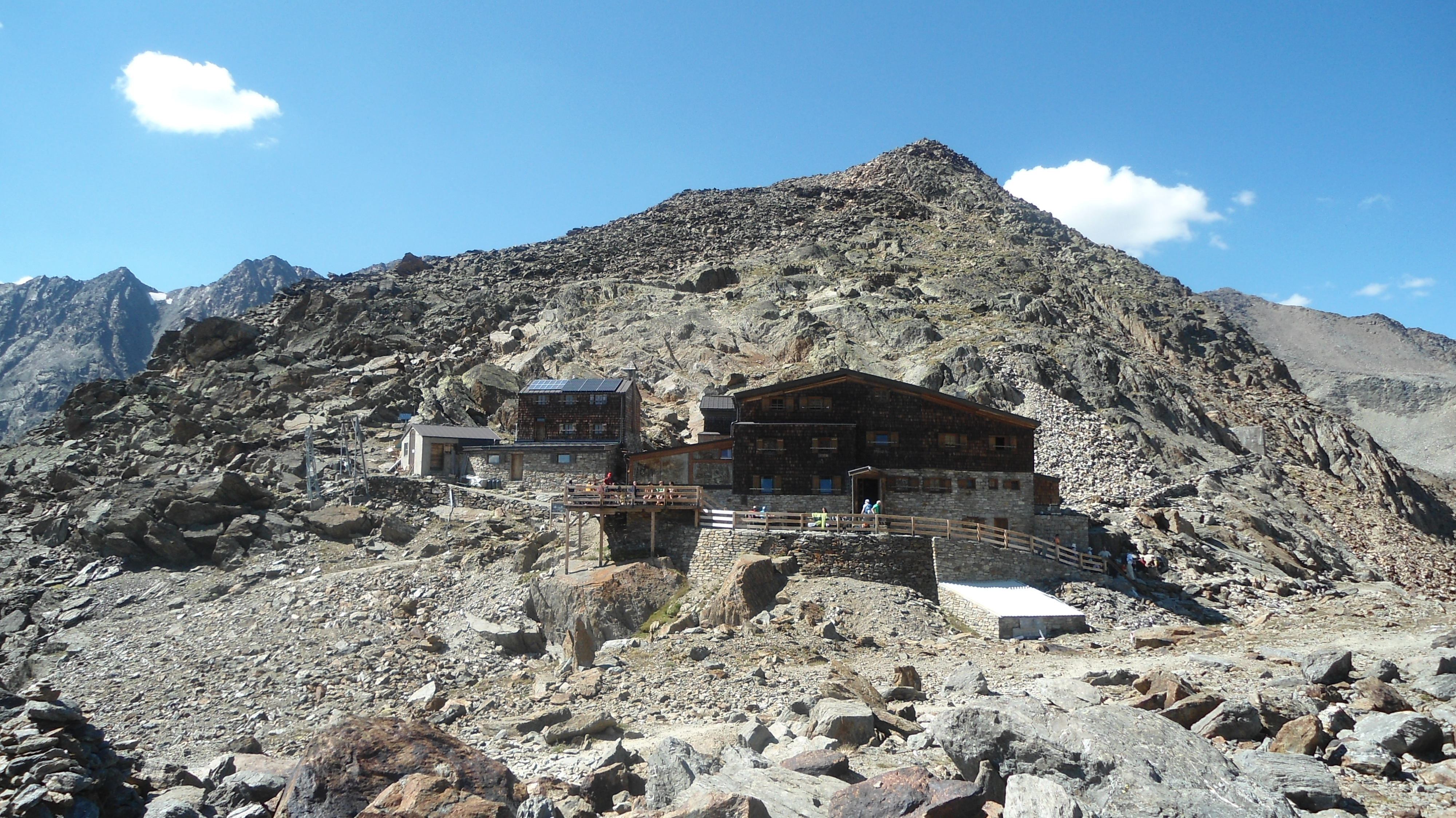 Panoramica del Rifugio Similaun a 3019 mt. di quota in Val Senales in prossimita del confine Austriaco.